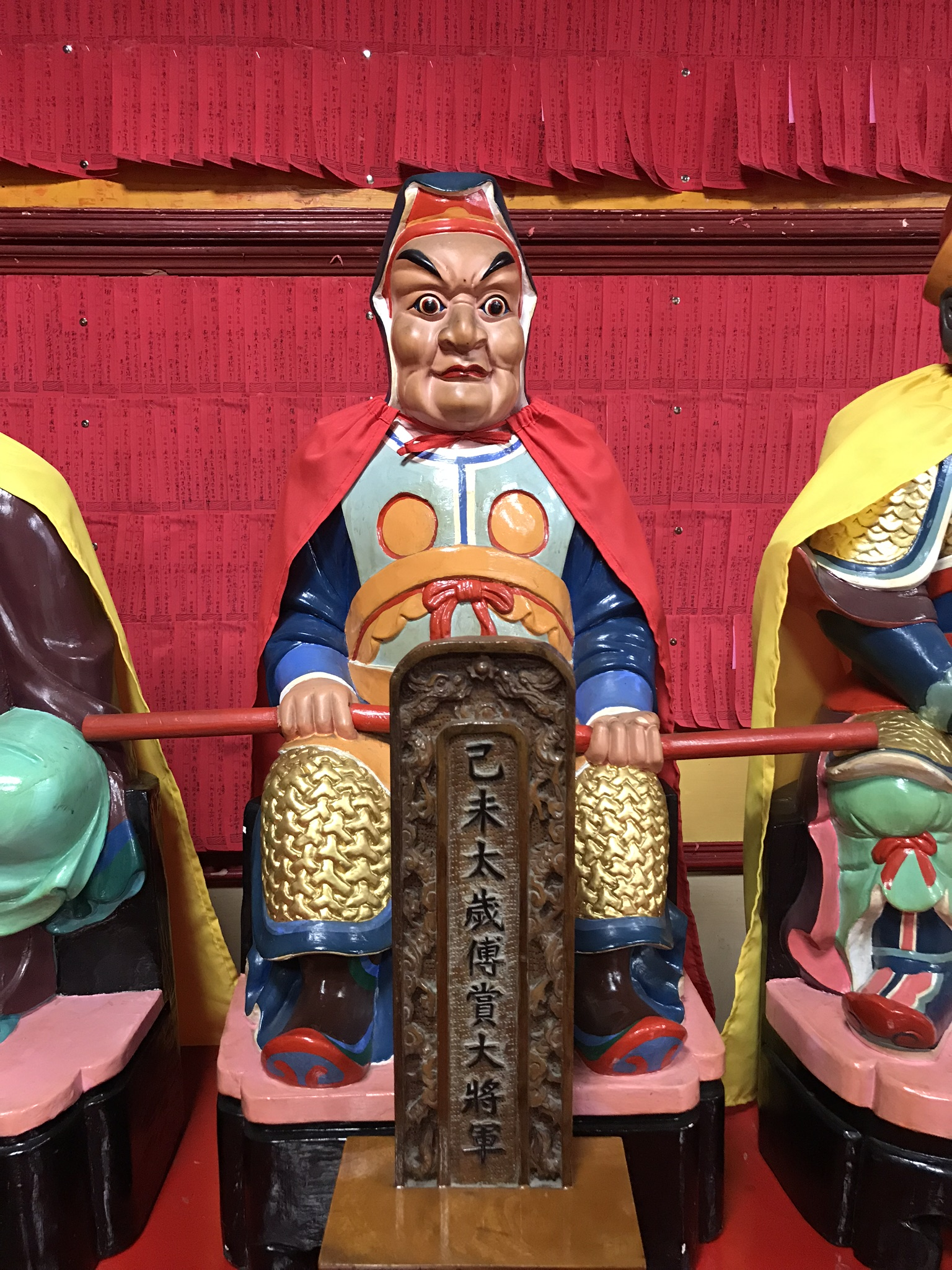 己未太歲傅黨大將軍神像